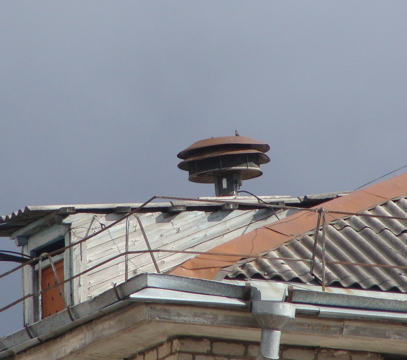 Сирена оповещения на кровле, Россия